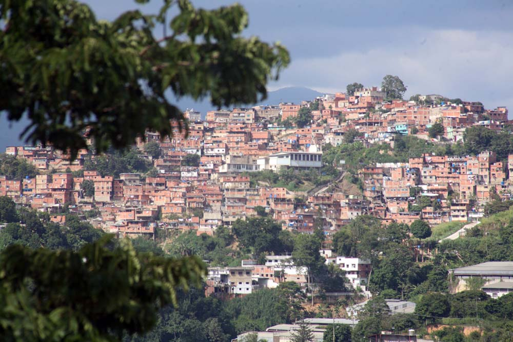 fina